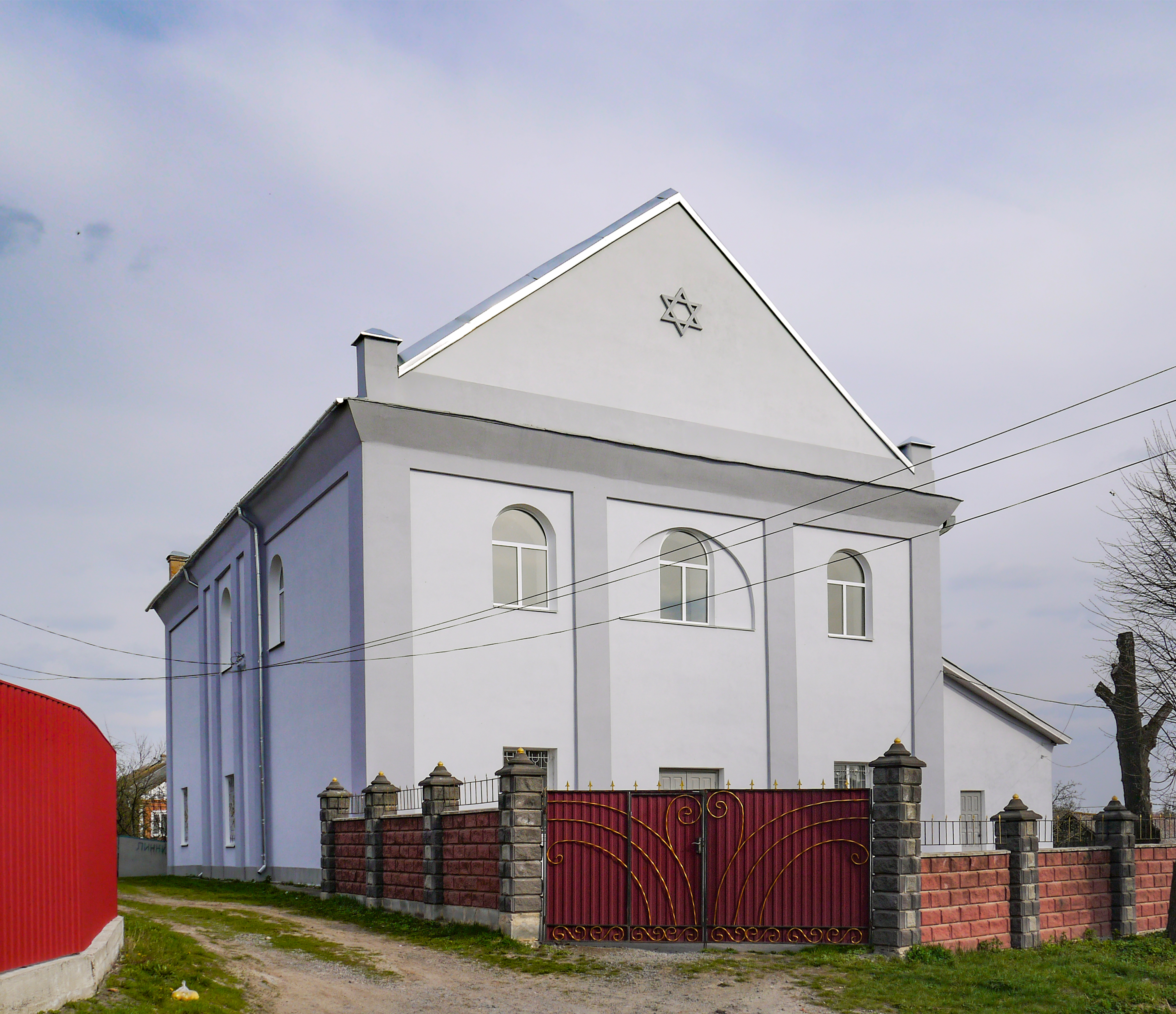 Синагога, Шепетівка, вул. Нісензона, 1